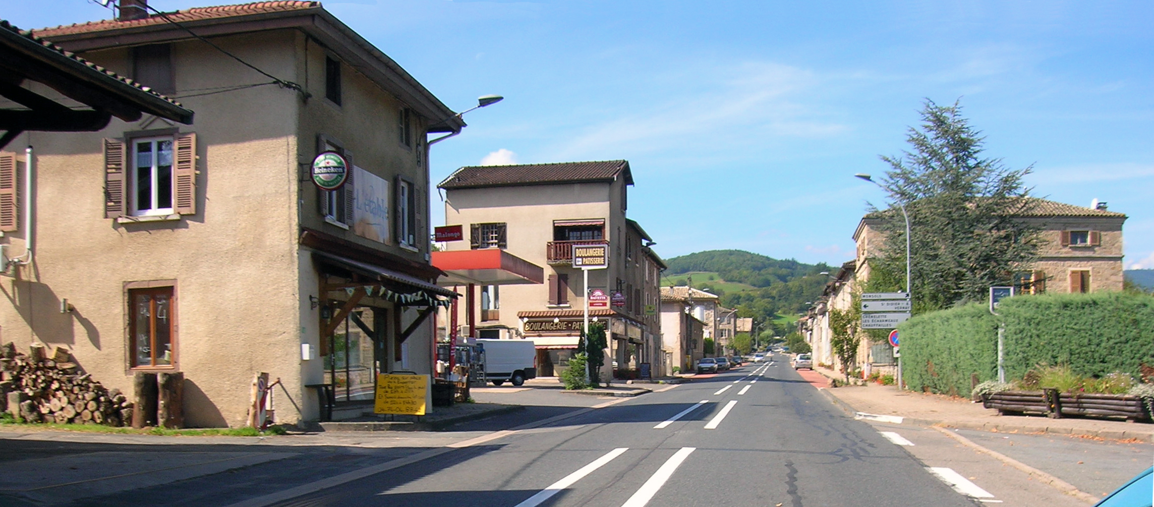 Les Dépôts, Saint-Didier-sur-Beaujeu, RHONE, FRANCE